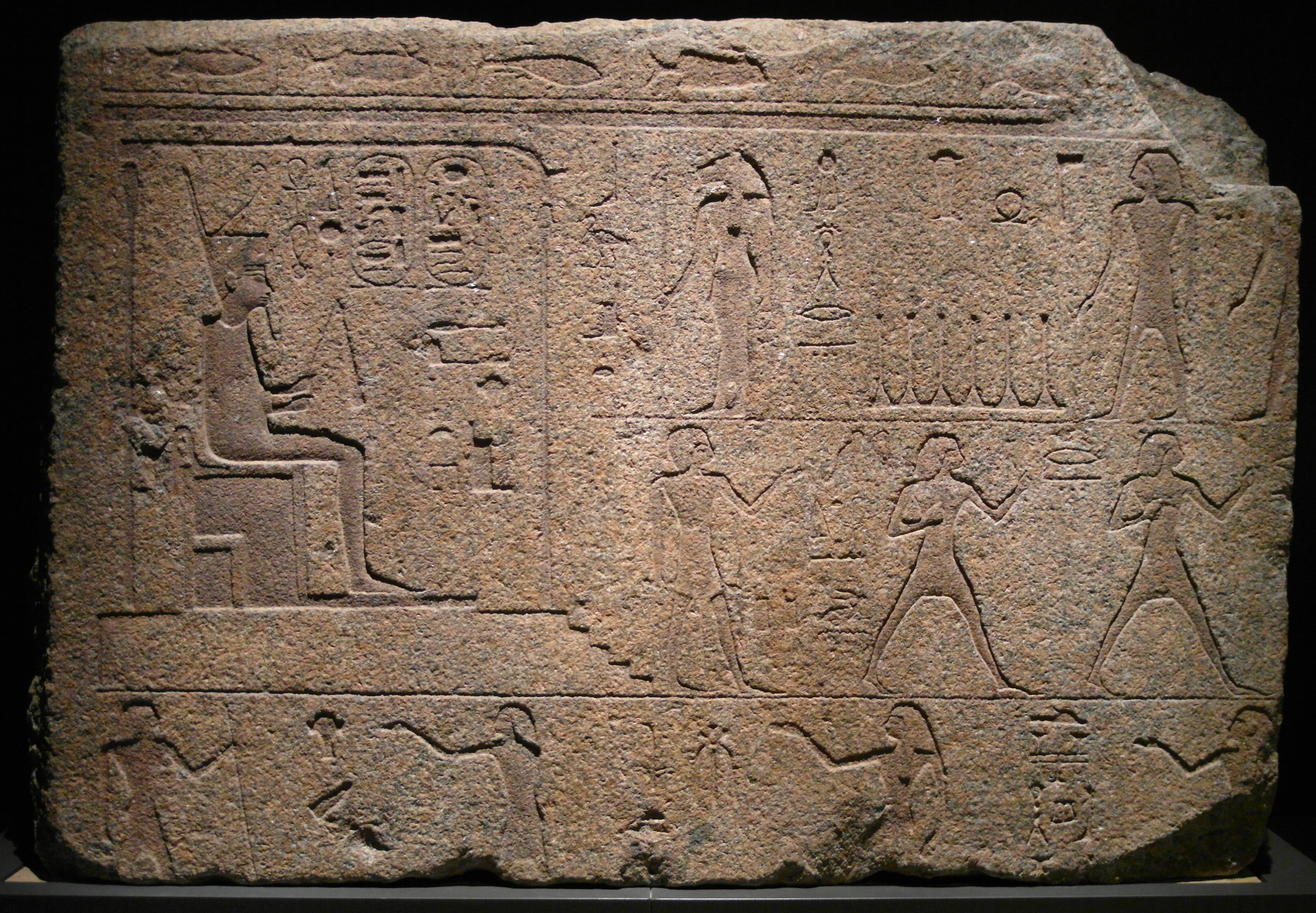 Relieve del faraón Osorcón II en su Fiestad Sed, para celebrar los treinta años de reinado. Parte del portal del templo de Bastet en Bubastis. El faraón aparece en un pabellón, frente a Bastet, con el manto tradicional de la fiesta. Los sacerdotes recitas la fórmulas sagrada participan en la carrera ritual y preparan ofrendas. Granito rojo, dinastía XXII, reinado de Osorcón II (hacia 874-850 a. C.). Templo de Bastet en Bubastis. EA 1105.